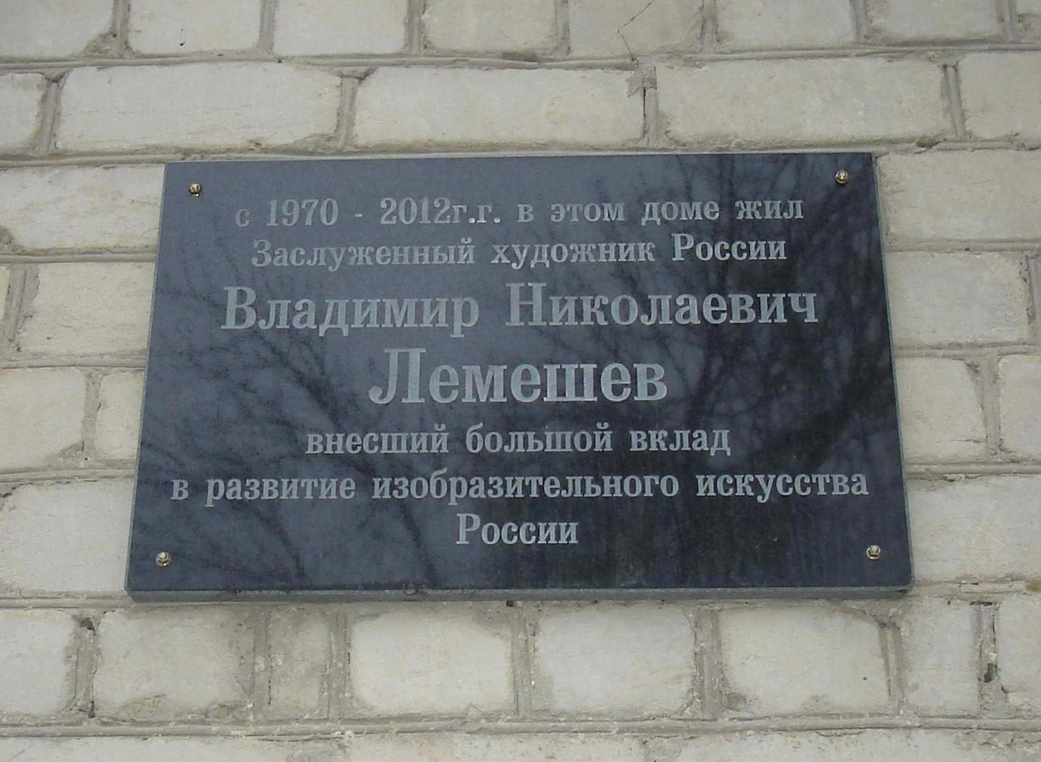 Мемориальная доска В. Н. Лемешеву в Роствое-на-Дону